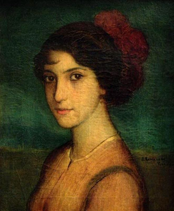 La argentinita, de Julio Romero de Torres. 1915. Óleo y temple sobre lienzo. 38 x 32 cm. Expuesto en el Museo Julio Romero de Torres de Córdoba, (España).